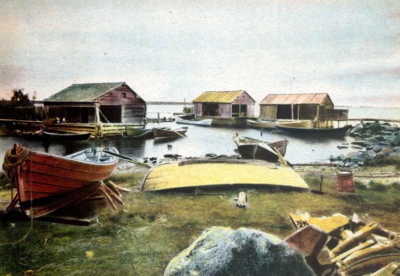 Stor-Brändön i Luleå skärgård